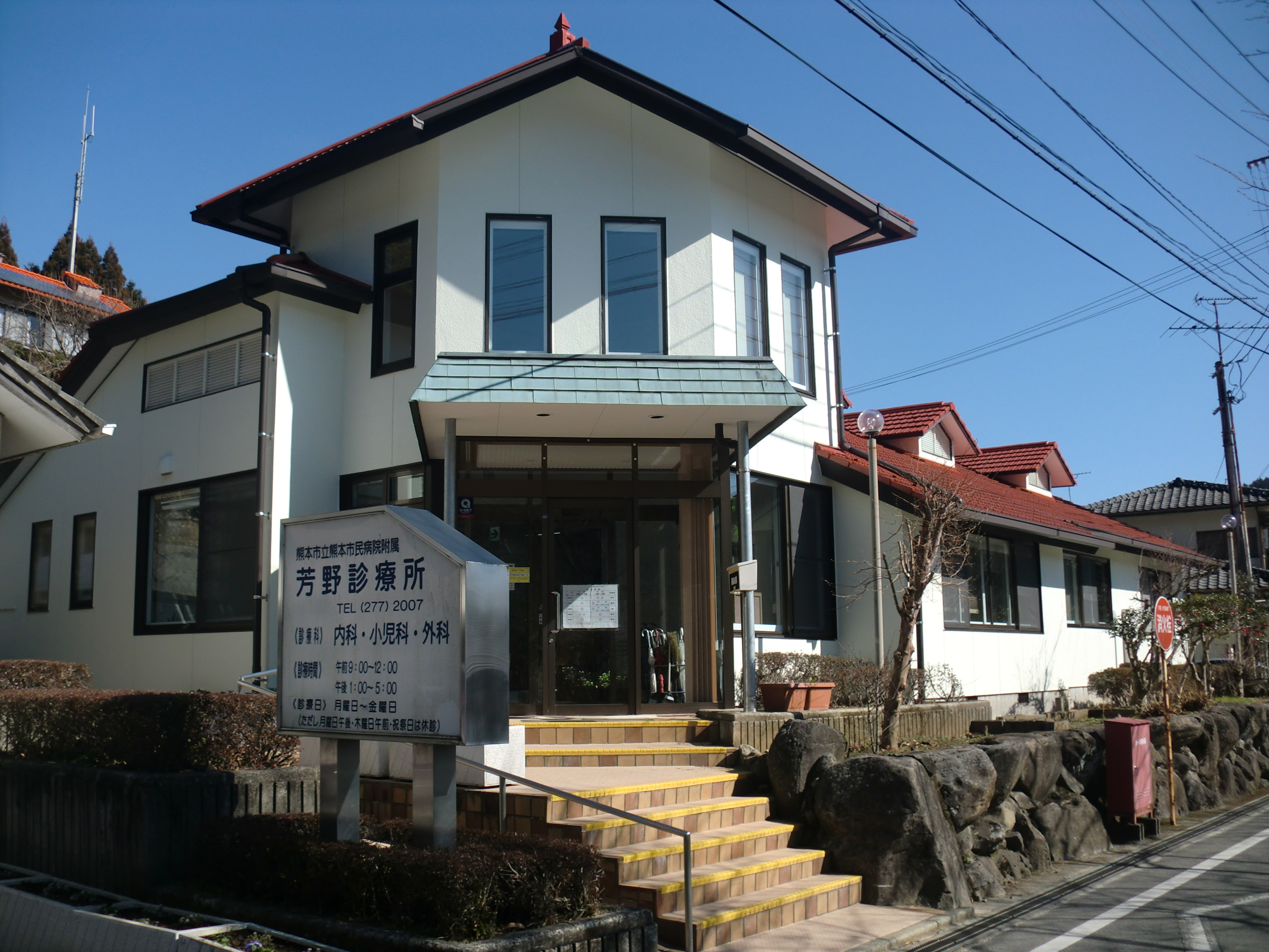 熊本市西区にある熊本市民病院付属芳野（よしの）診療所（旧：河内町立芳野診療所）